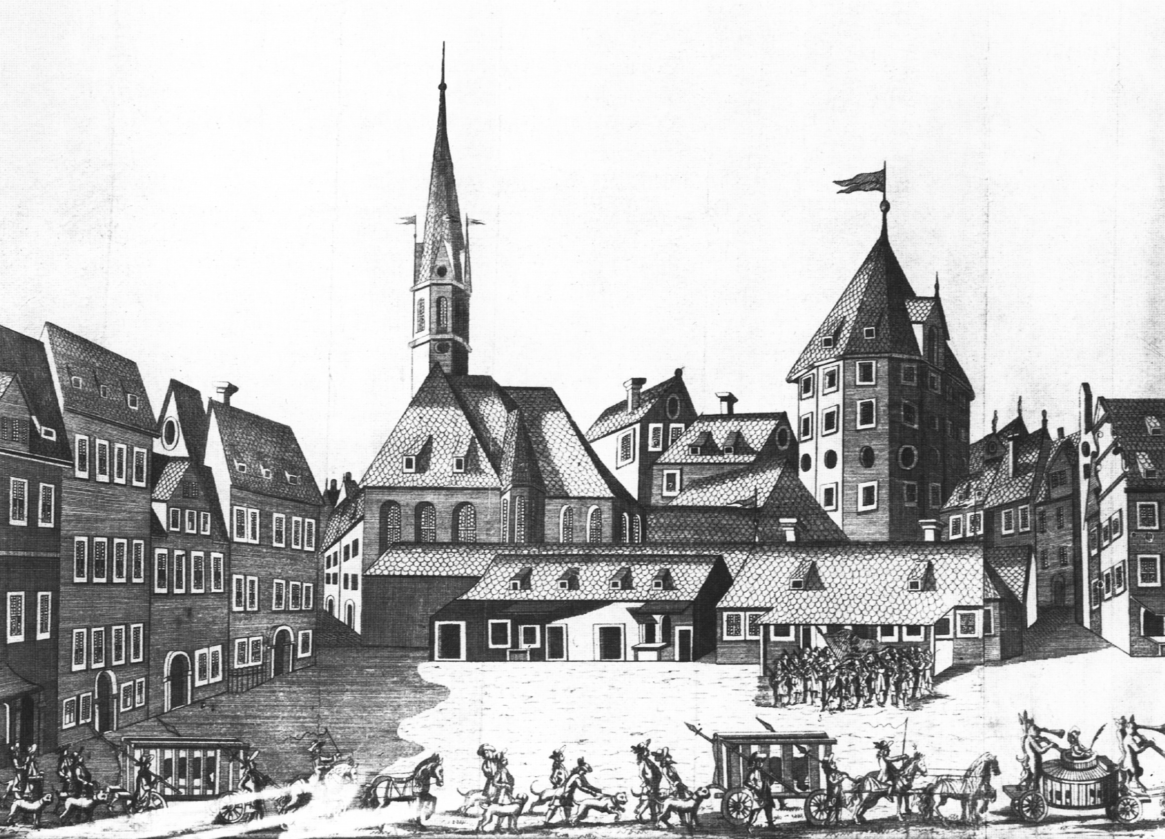 Der Neumarkt mit Frauenkirche (l.), Pulverturm (r.), im Vordergrund Wachgebäude der Dresdner Garnison